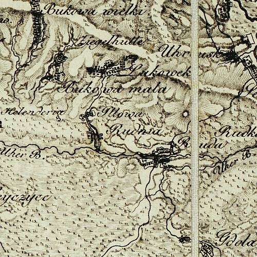 Iłowa i Rudnia na mapie Galicji Zachodniej, 1808 r.